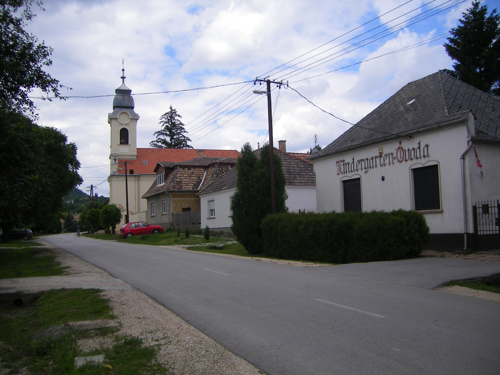 Vértestolna - Petőfi Sándor utca a katolikus templommal és az óvodával